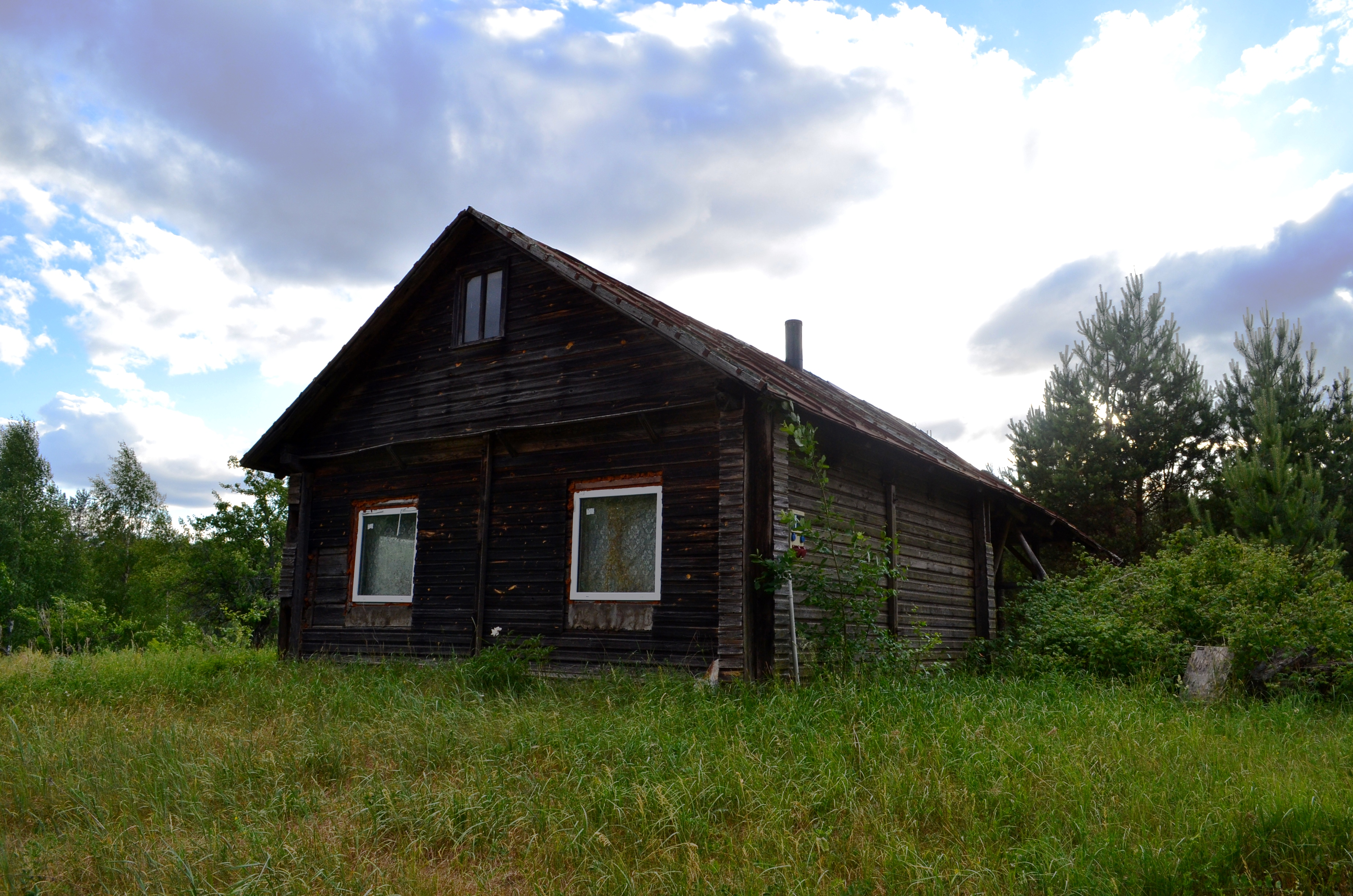 Sapiegiškė, Varėnos raj.